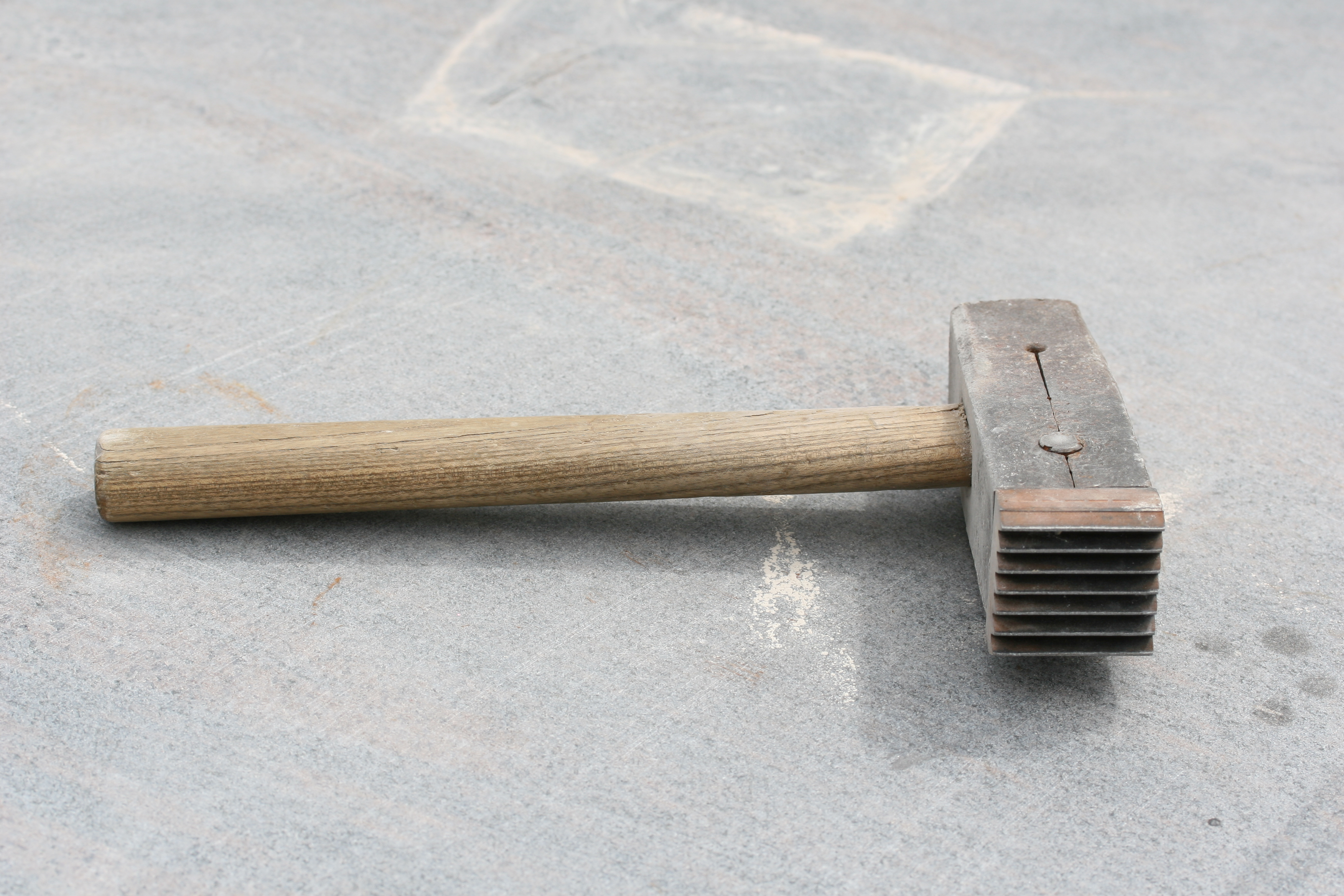 Riffelhammer